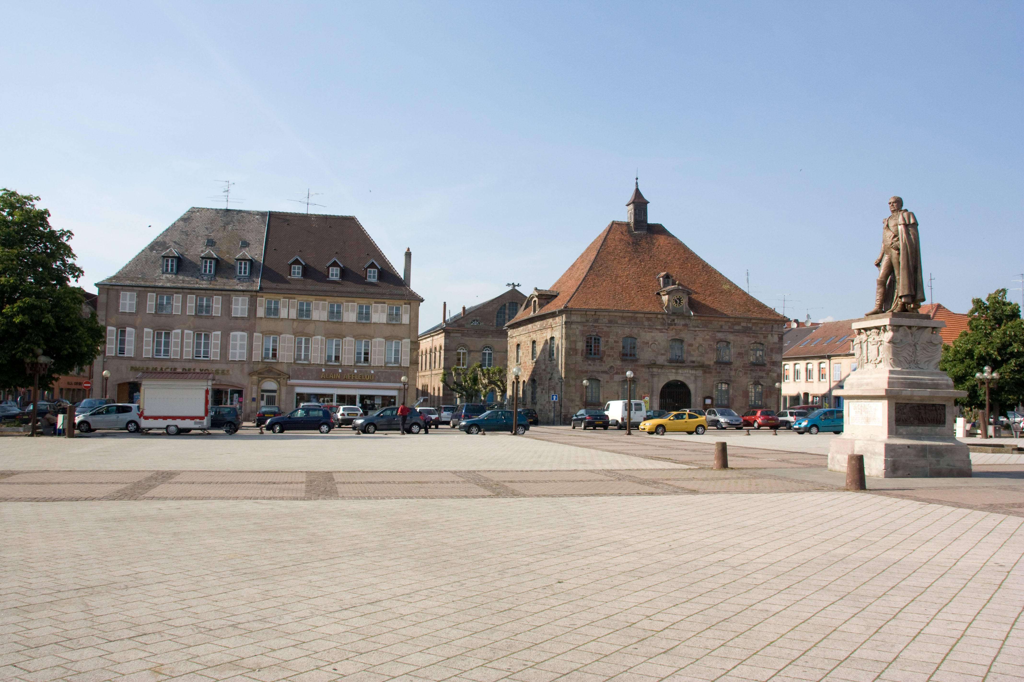 La Place d’Armes de Phalsbourg, Phalsbourg, Moselle